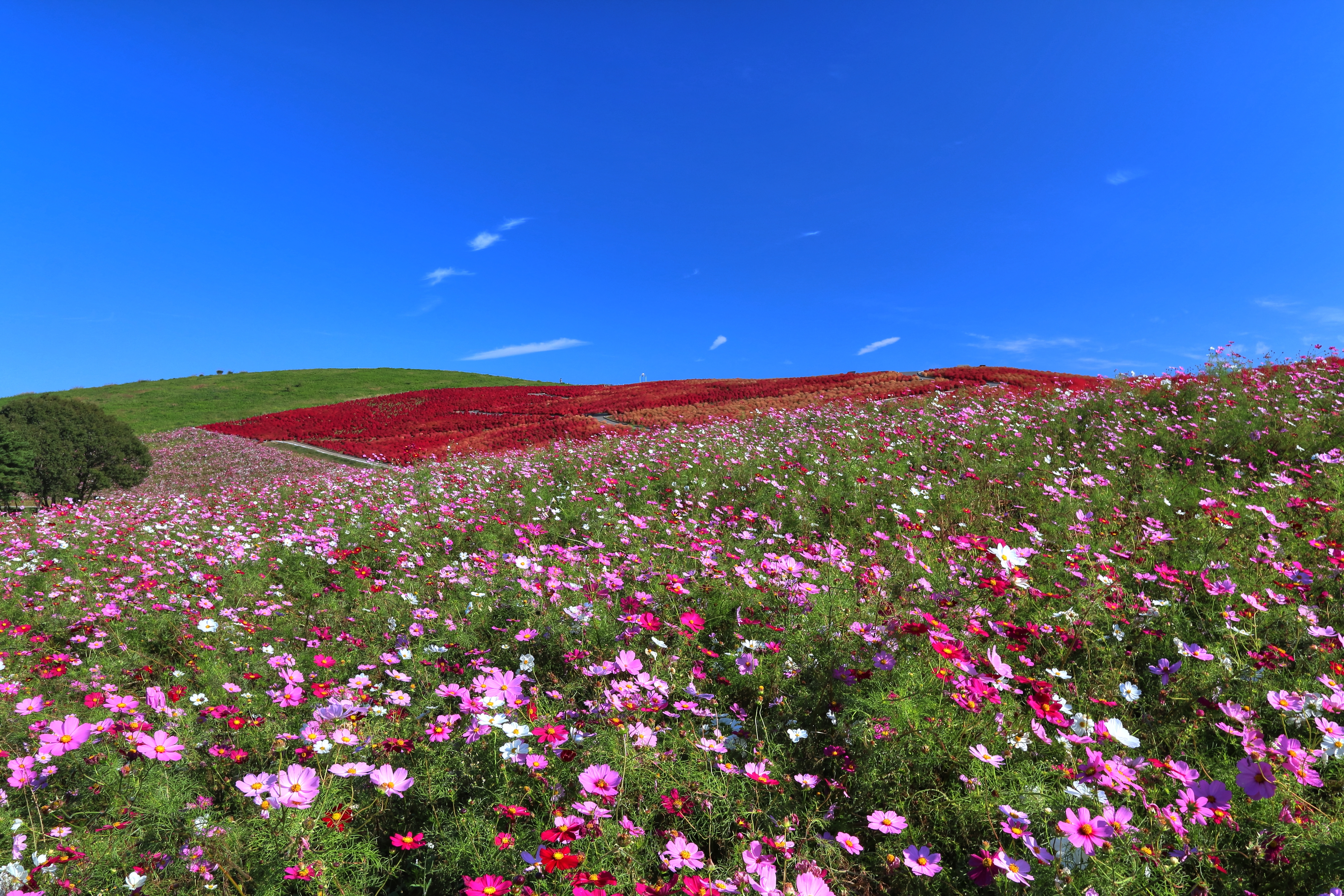 ひたち海浜公園